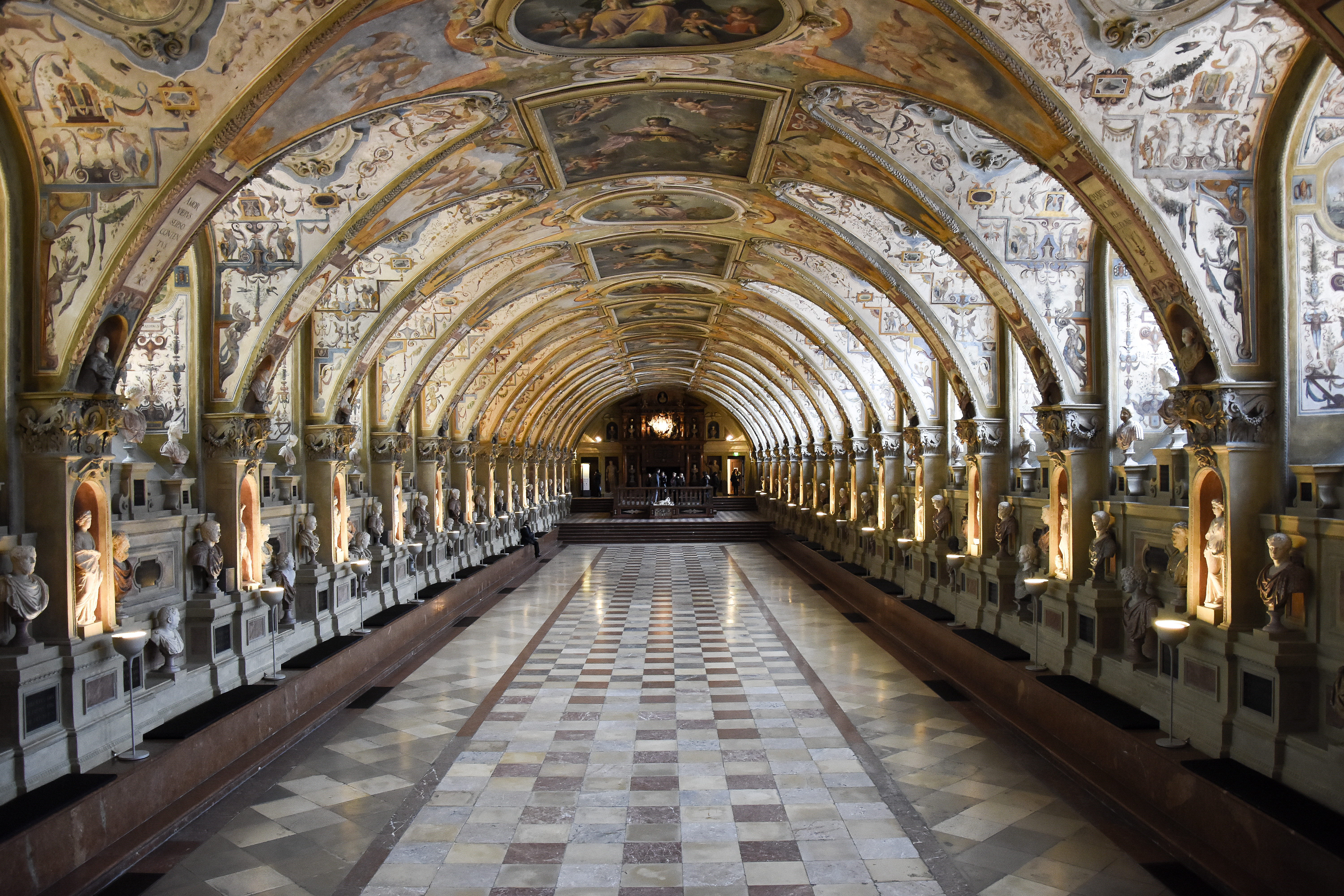 Het Antiquarium van de Residentie van München